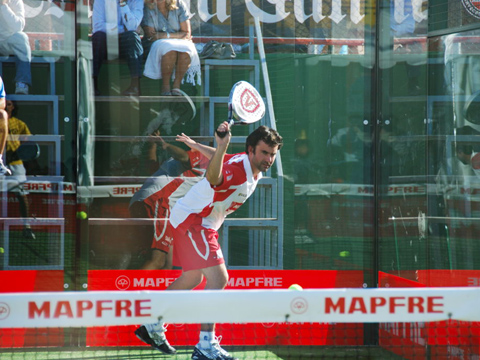 Ignacio Otero